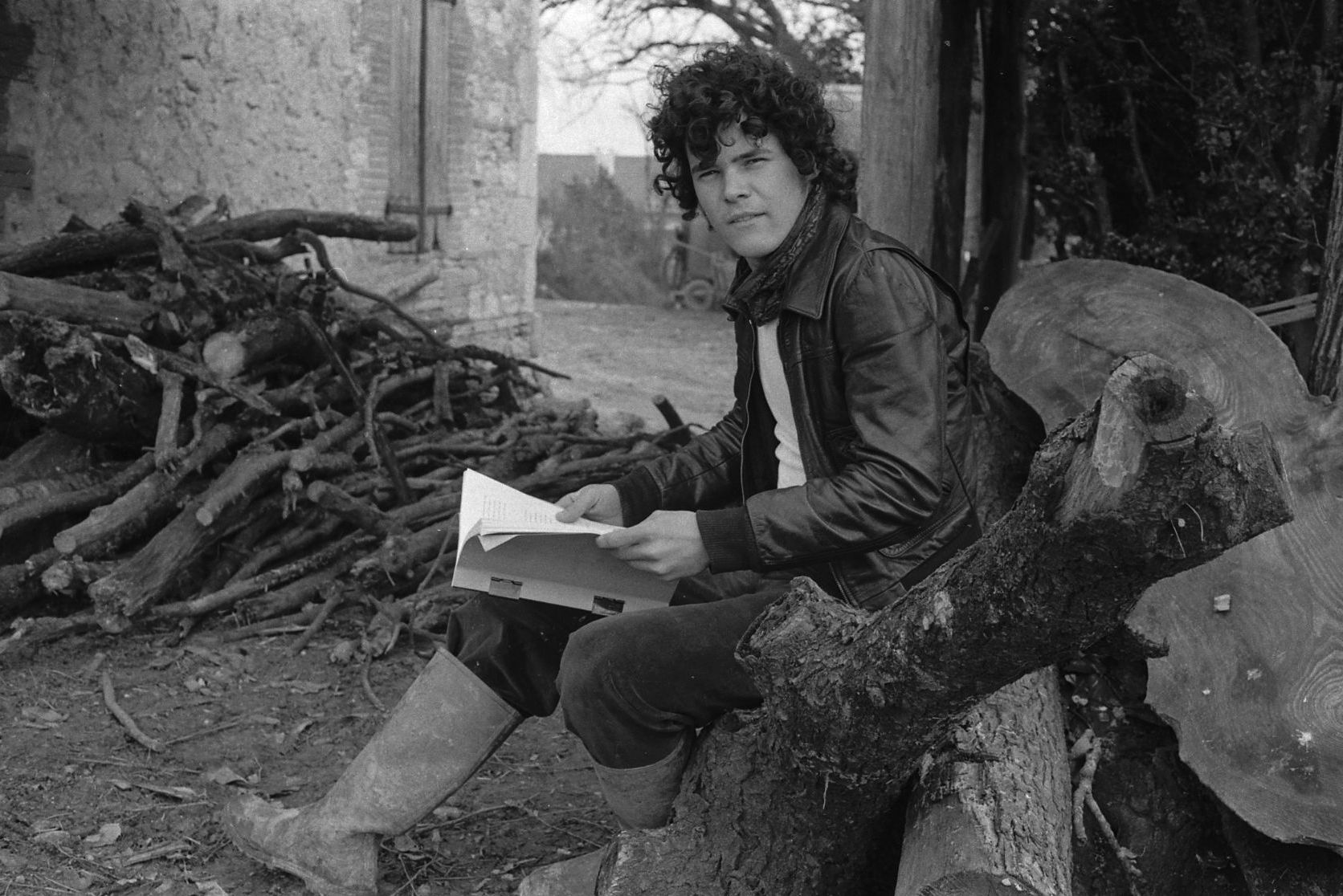 Durfort-Lacapelette (Tarn-et-Garonne). 5 Février 1975. Vue de Pierre Blaise relisant son texte assis sur un tronc d'arbre.